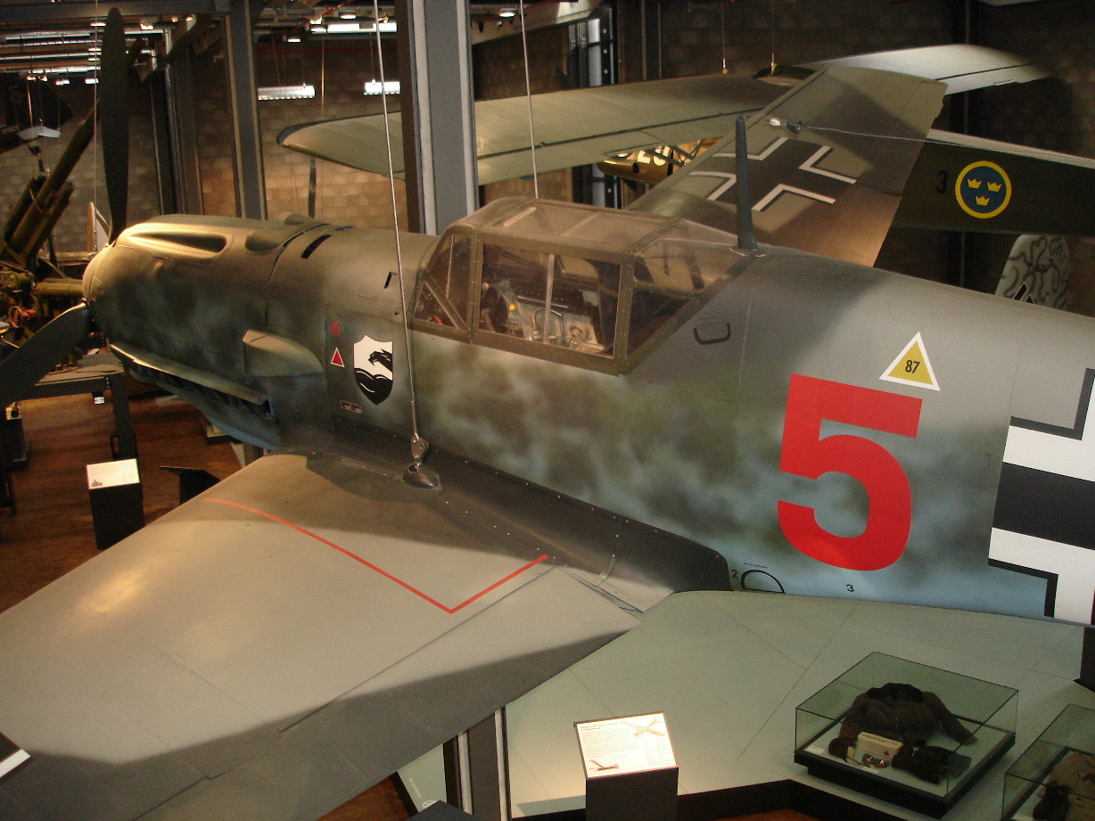 Picture taken Feb 20, 2007 at Deutsches Technik Museum in Berlin